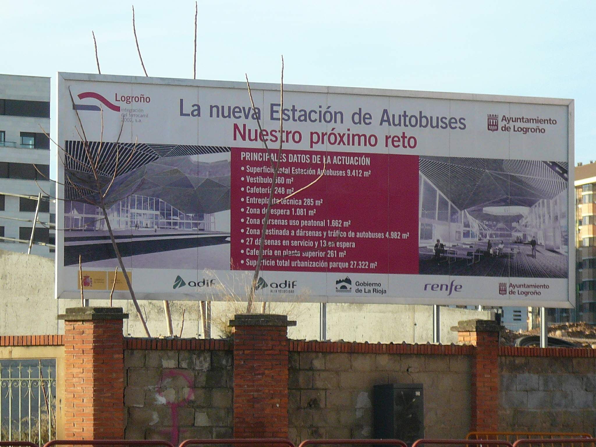 Cartel anunciador de la nueva estación de autobuses de Logroño (febrero 2019)